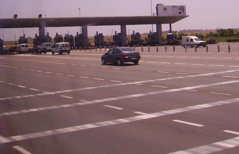 Barriére de péage sur l'autoroute A3 en direction de Casablanca